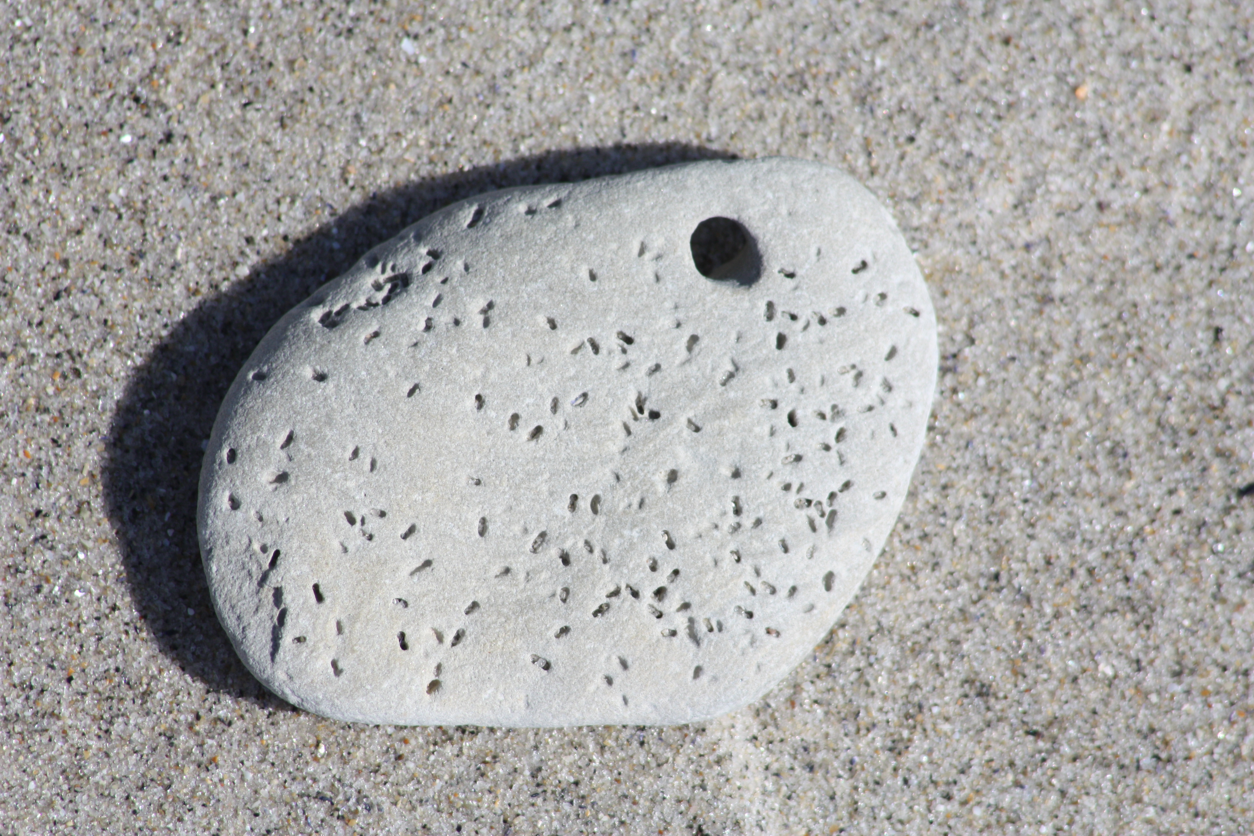 Helgoländer Düne, Helgoland. Das große Loch stammt von einer Bohrmschel? oder einem Felsenbohrer (Hiatella arctica); Löcher im Stein, die von Polydora cilliata stammen (das große Loch stammt von einer Bohrmuschel)